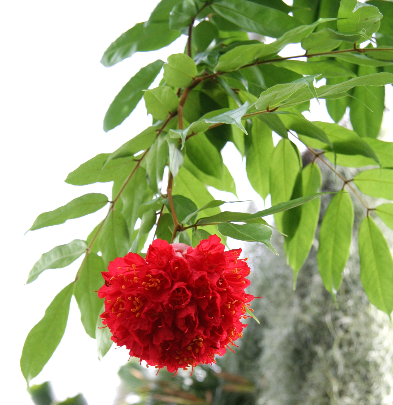 Brownea ariza im Botanischen Garten Dresden